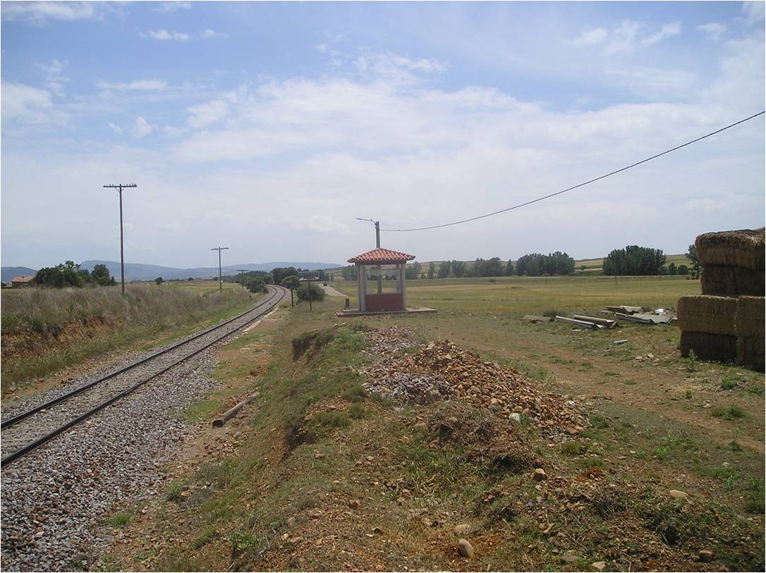 Nuevo apeadero de Villadoz.